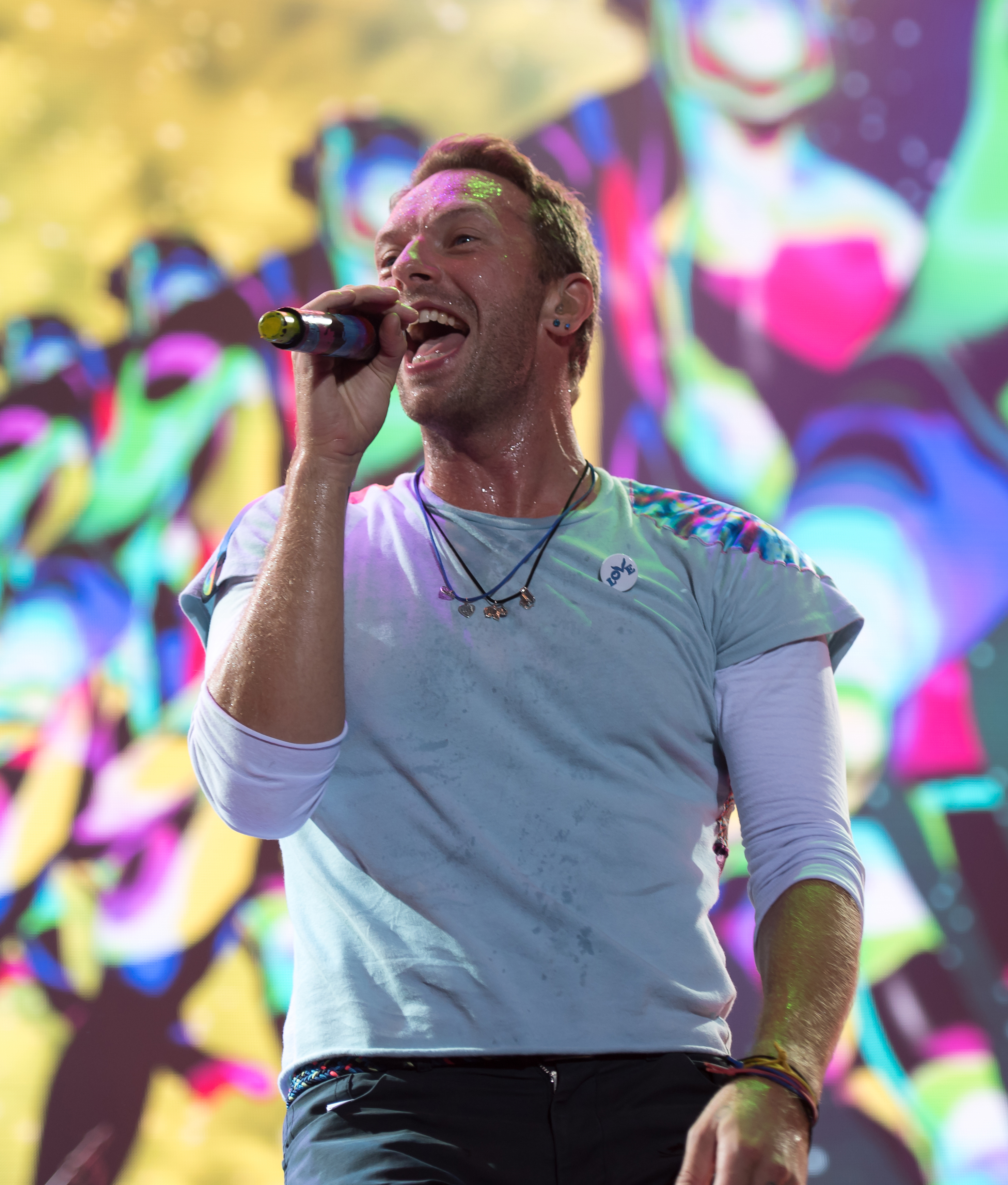 Chris Martin beim Global Citizen Festival in Hamburg